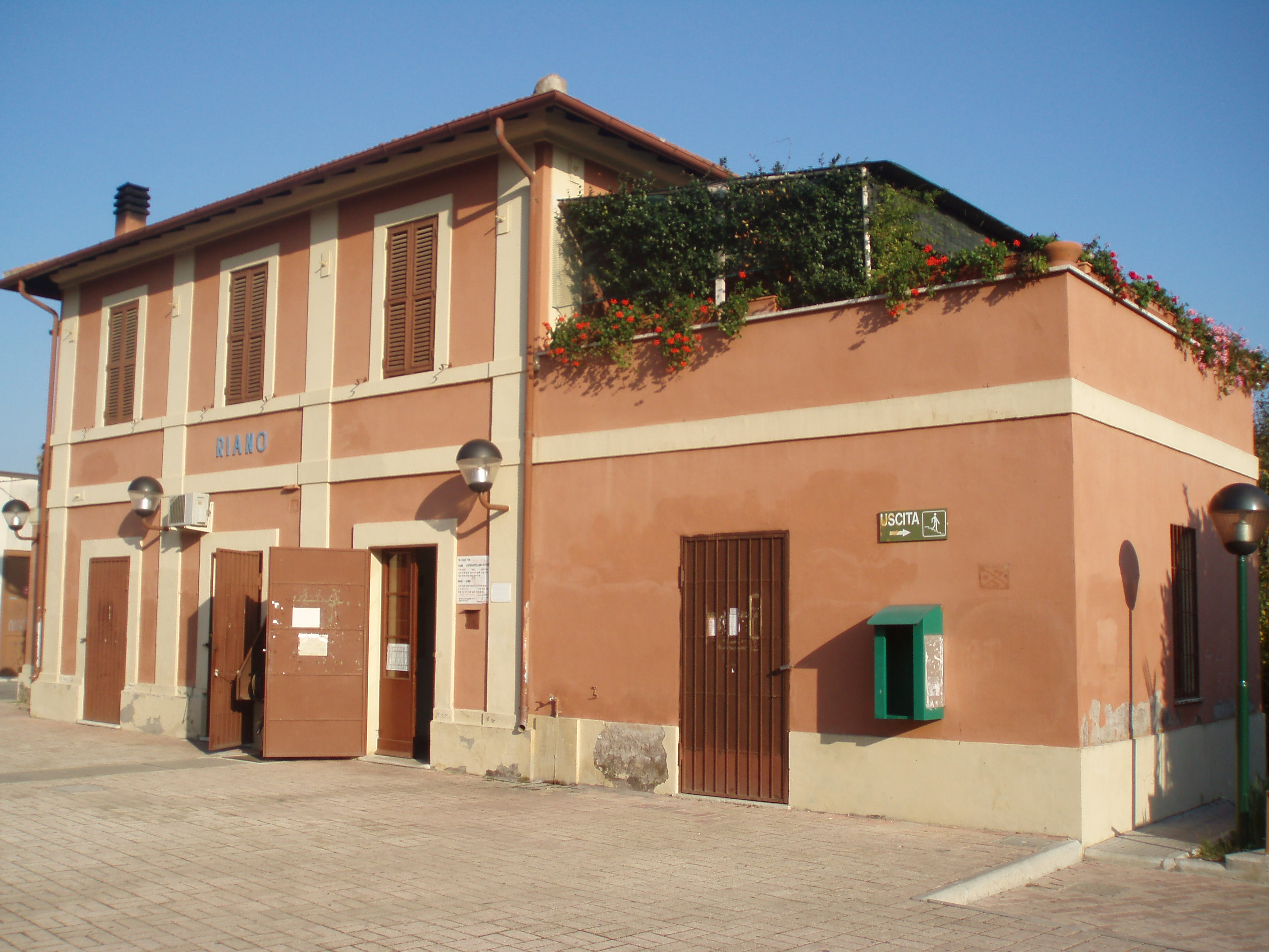 Ferrovia Roma Civita Castellana Viterbo. Stazione di Riano